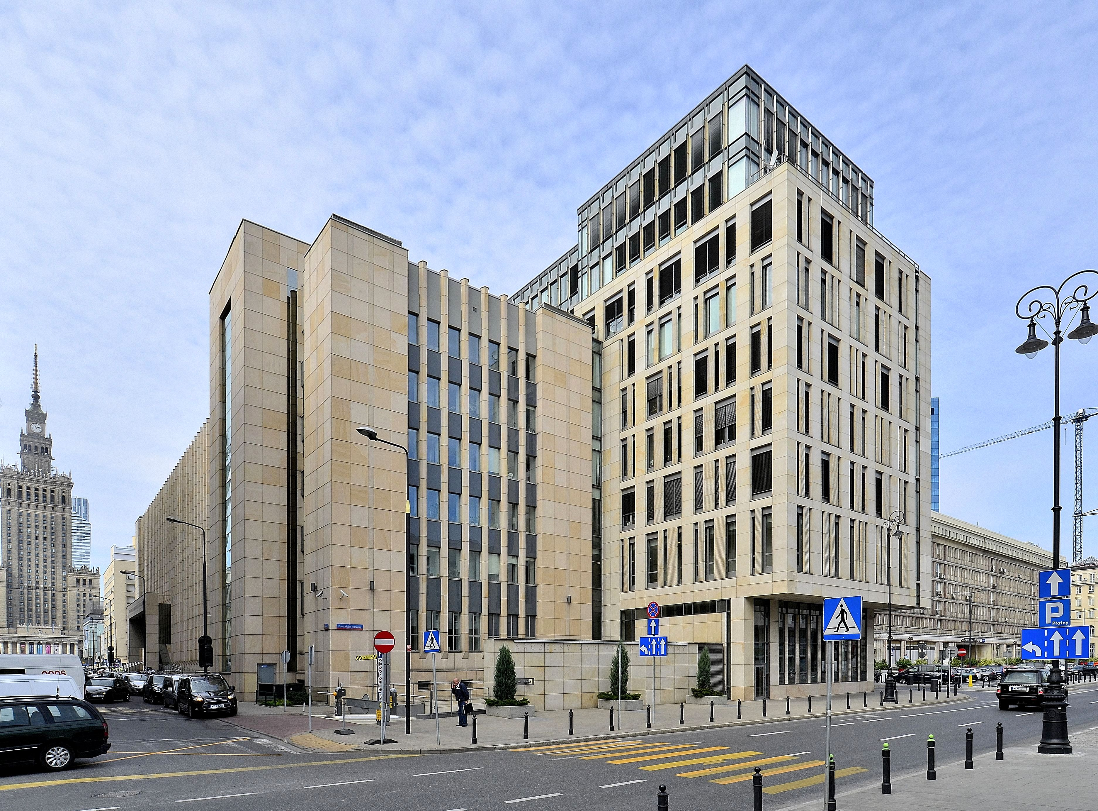 Gmach Naczelnego Sądu Administracyjnego przy ul. Boduena 3/5 w Warszawie, widok od strony placu Powstańców Warszawy i ul.Przeskok